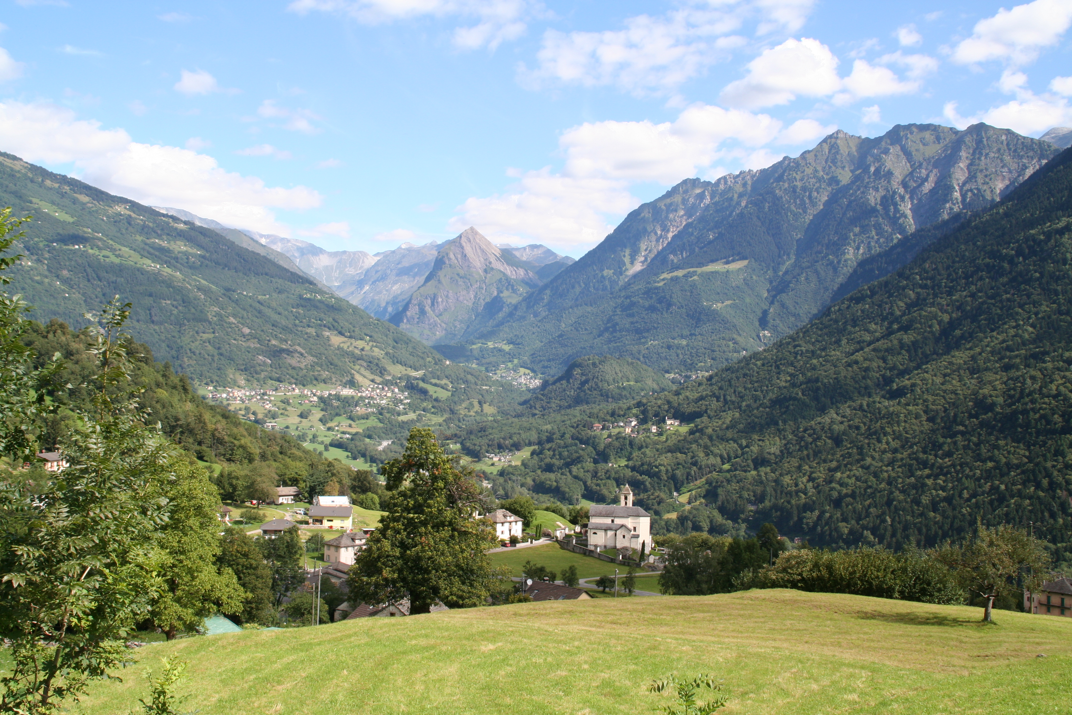 Vale di Blenio nach Norden, vorne die Kirche von Corzoneso